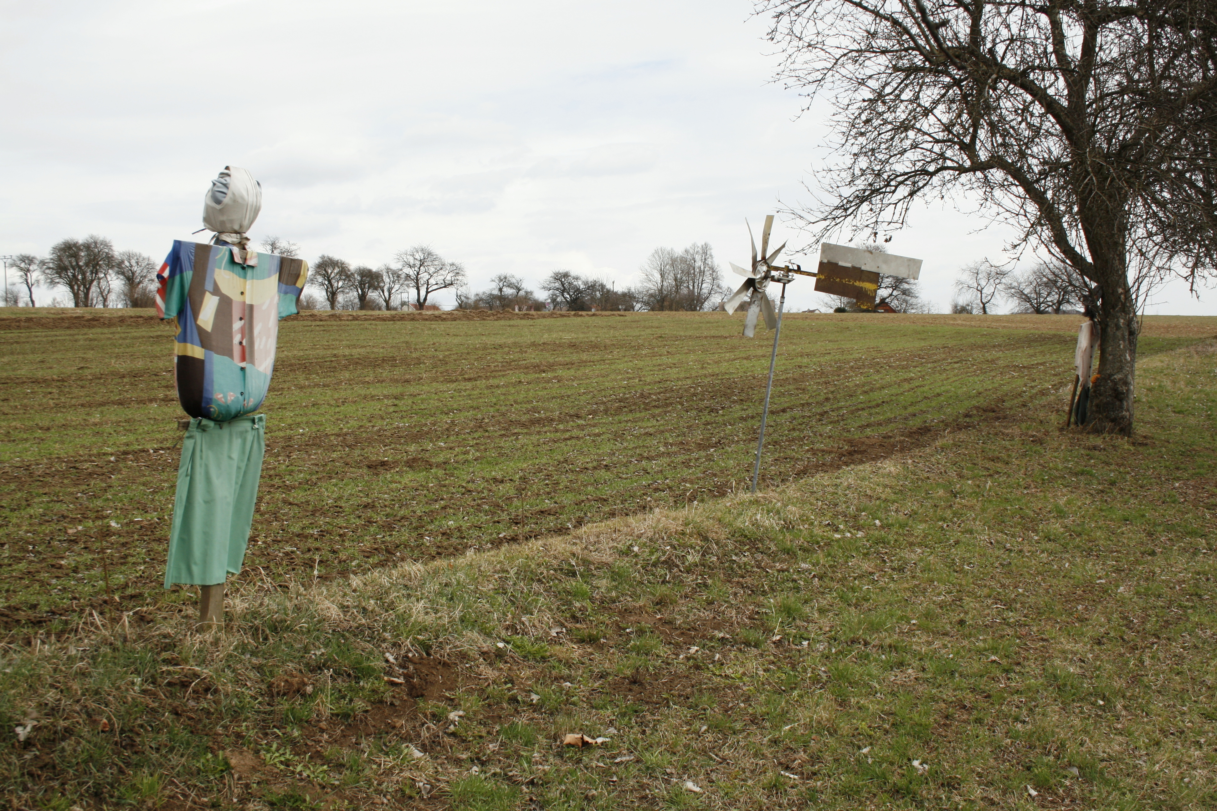 Strašáci na poli poblíž Truskavny